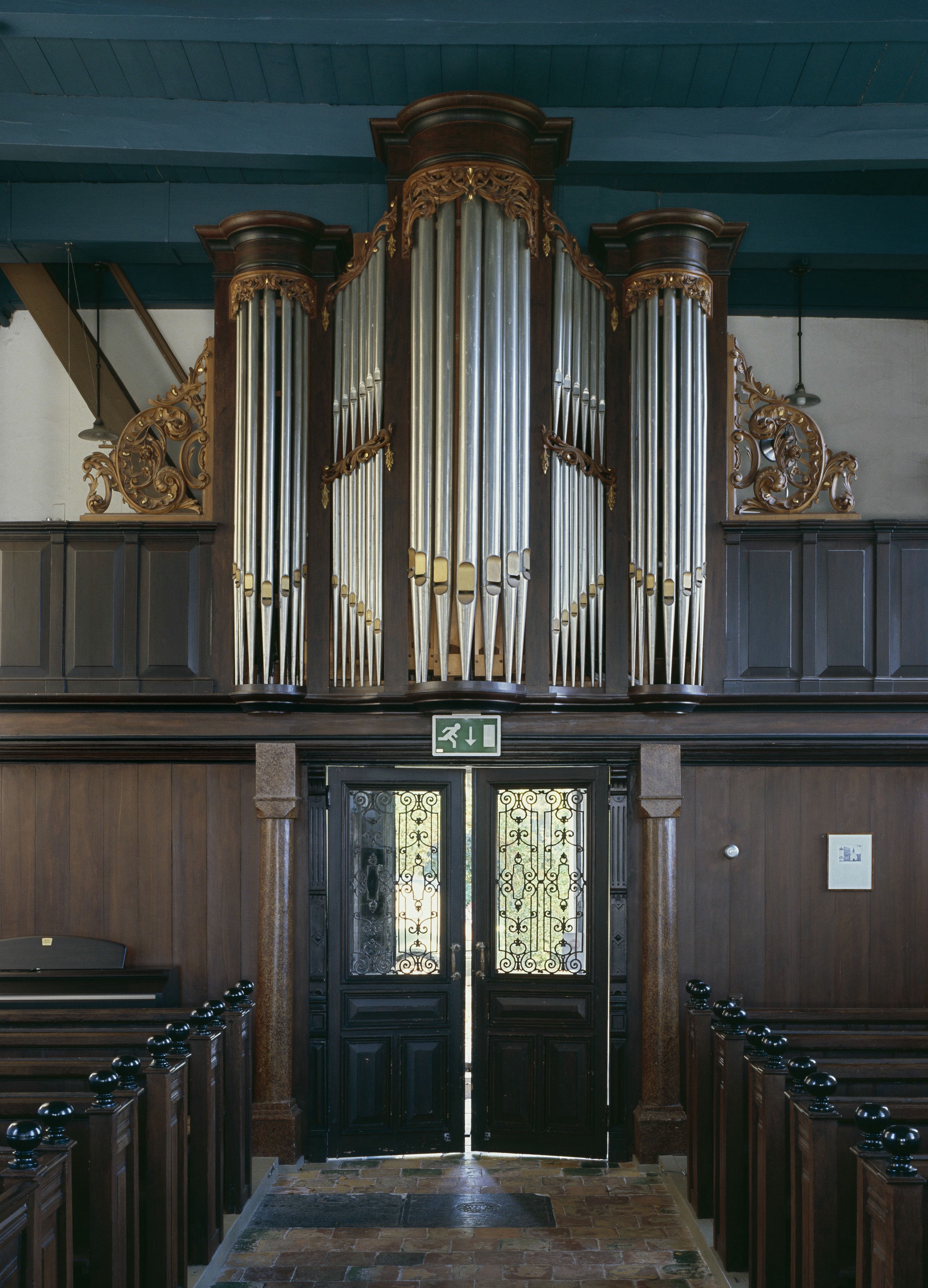 Nederlands Hervormde Kerk: Interieur, aanzicht orgel, orgelnummer 18 (opmerking: Gefotografeerd voor Het Historische Orgel in Nederland 1894-1901, bladzijde 233)